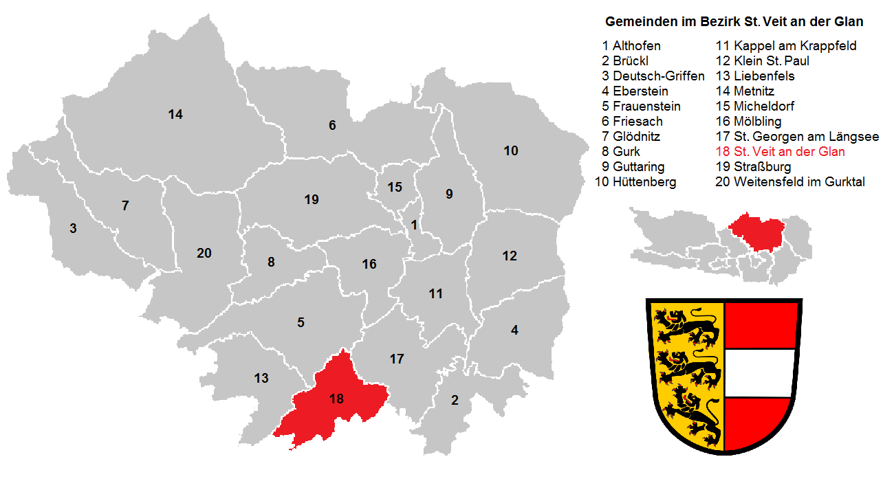 Bezirk Sankt Veit an der Glan